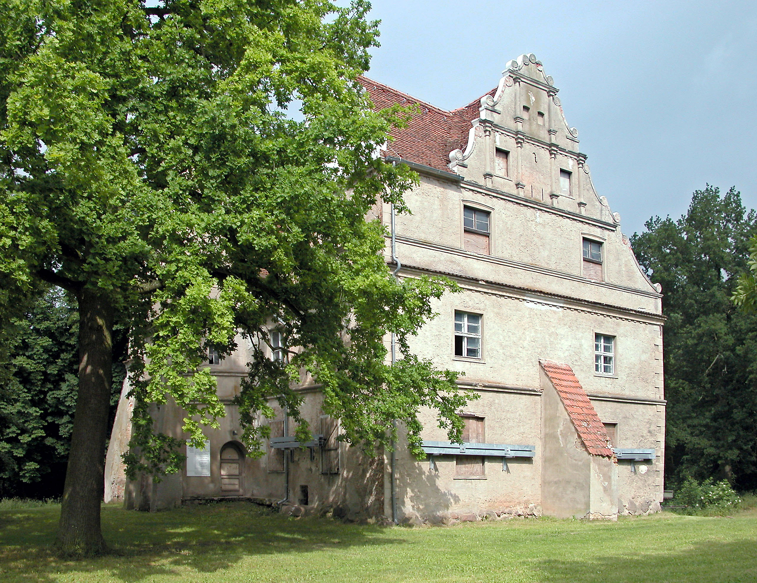 22.06.2004 17390 Quilow (zu Groß Polzin), Quilow 45: Ehemaliges Wasserschloß, in der zweiten Hälfte des 16. Jahrhunderts für Roleff von Owstin erbaut. In der DDR waren im Gebäude u.a. Wohnungen. Bei der Restaurierung 1958 - 1967 wurde der Wassergraben zugeschüttet, was zu statischen Problemen führte. Nach der Wende wurde das Schloß leergezogen. Sicht von Südosten. [DSCN3893.JPG]20040622220DR.JPG(c)Blobelt